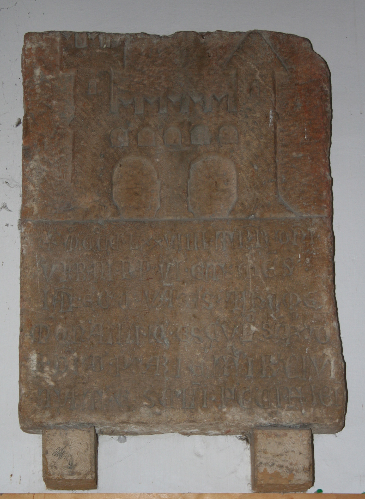 Stemma più antico della città di Ascoli Piceno, risalente all'anno 1379 custodito presso Palazzo dell'Arengo